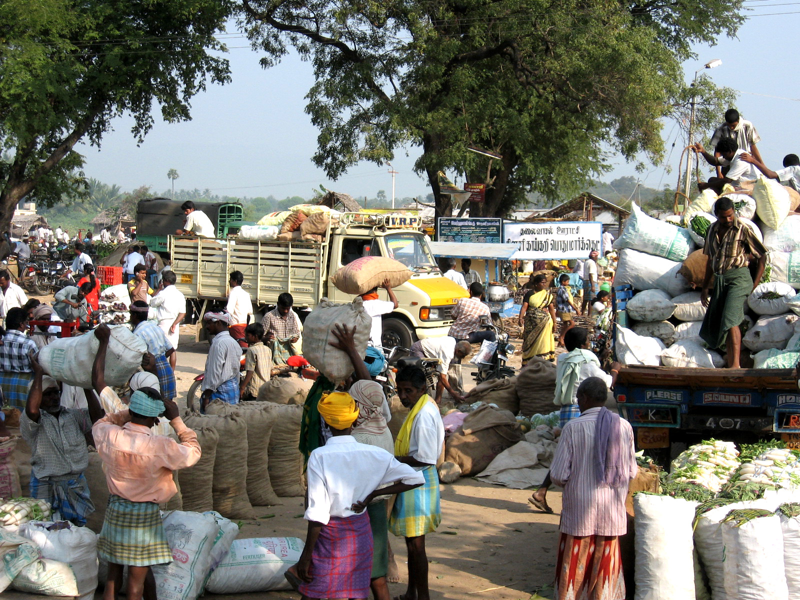 இந்திய மாநிலமான தமிழ்நாட்டிலுள்ள ஒரு சந்தைக்காட்சி.